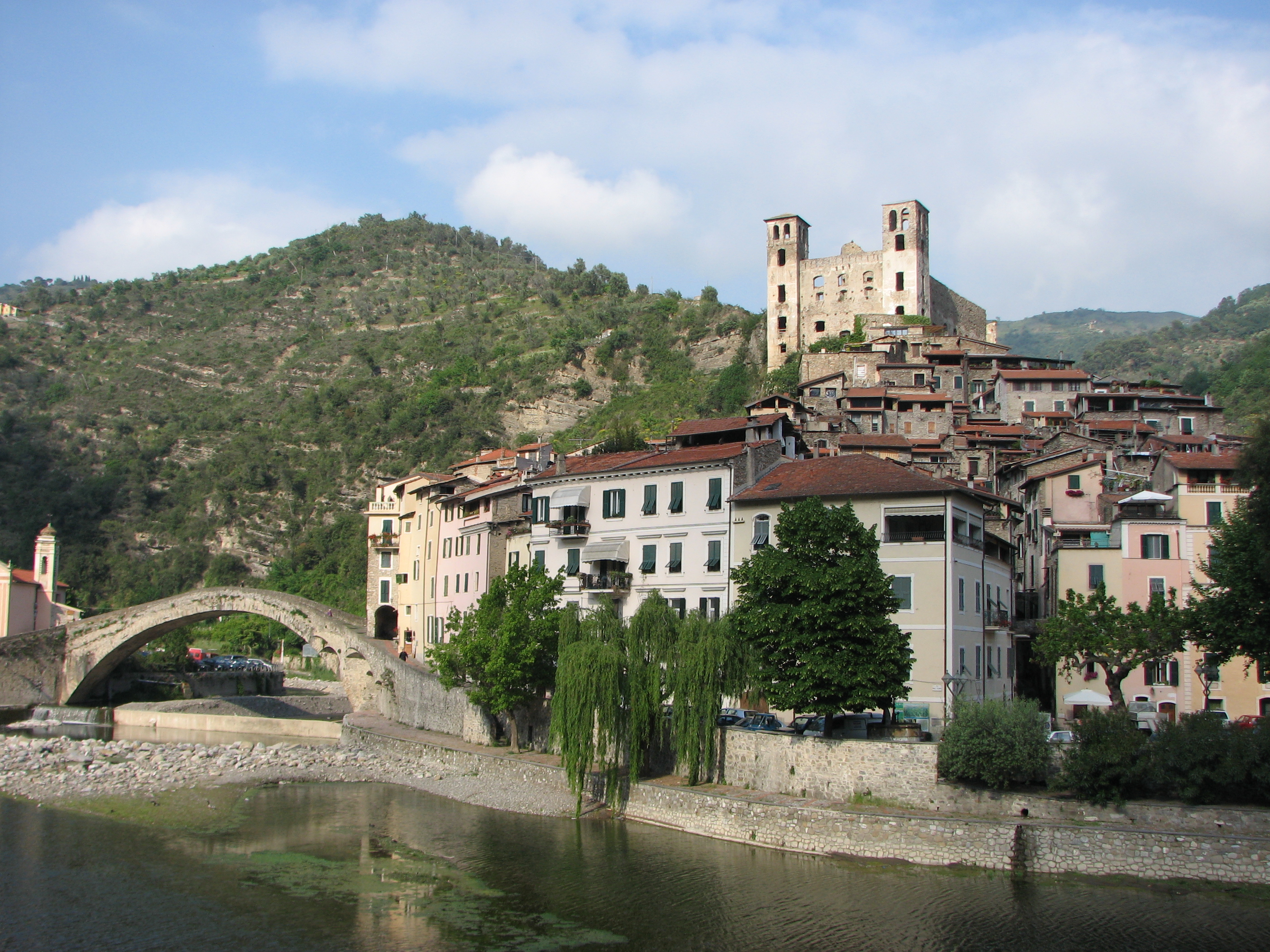 Piemontèis: Panorama dël borg vej.